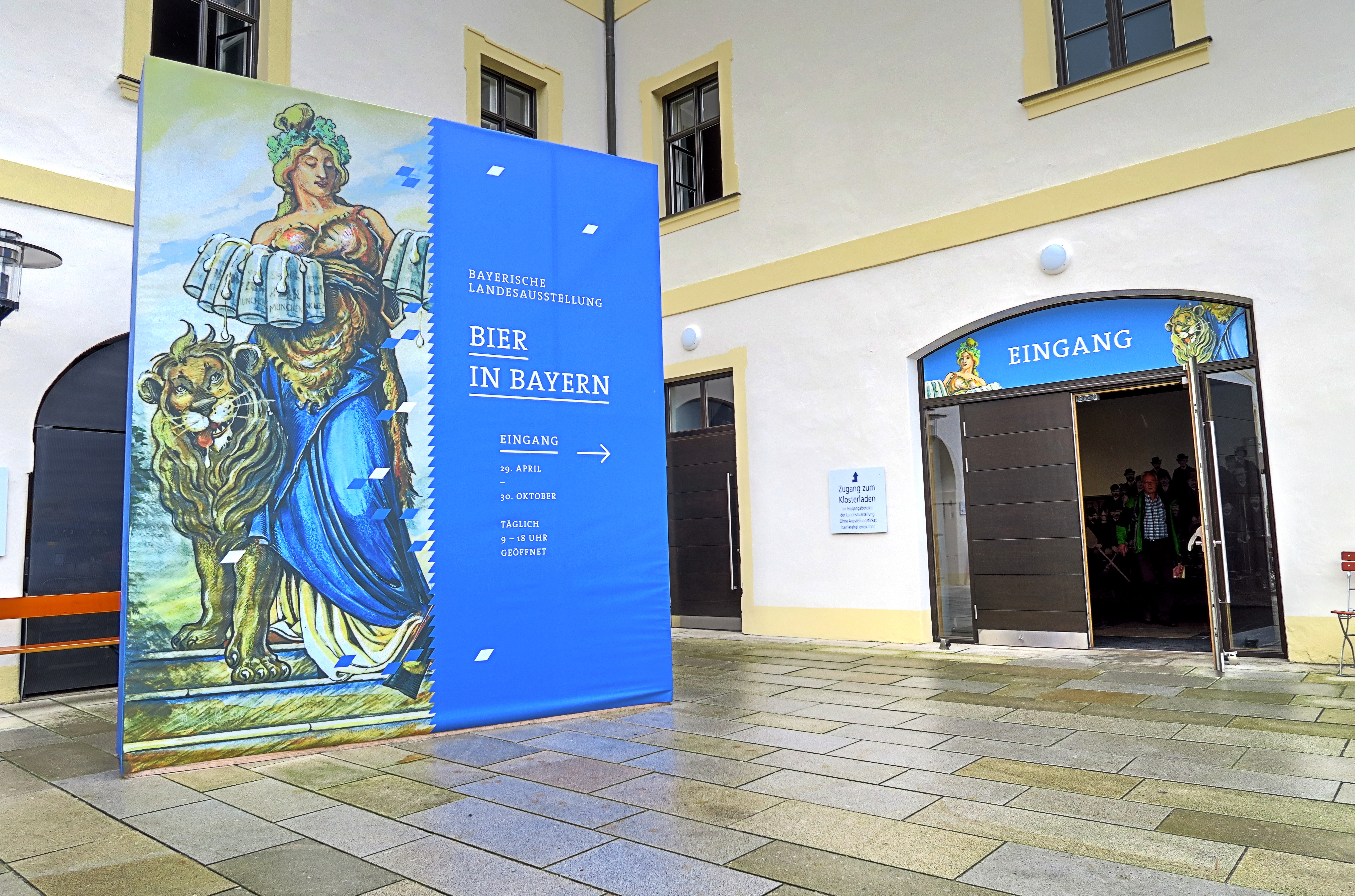 Deutschland, Bayern, Niederbayern, Landkreis Passau, Gemeinde Aldersbach, Kloster Aldersbach, Haupteingang zur Bayerischen Landesausstellung 2016: "Bier in Bayern"